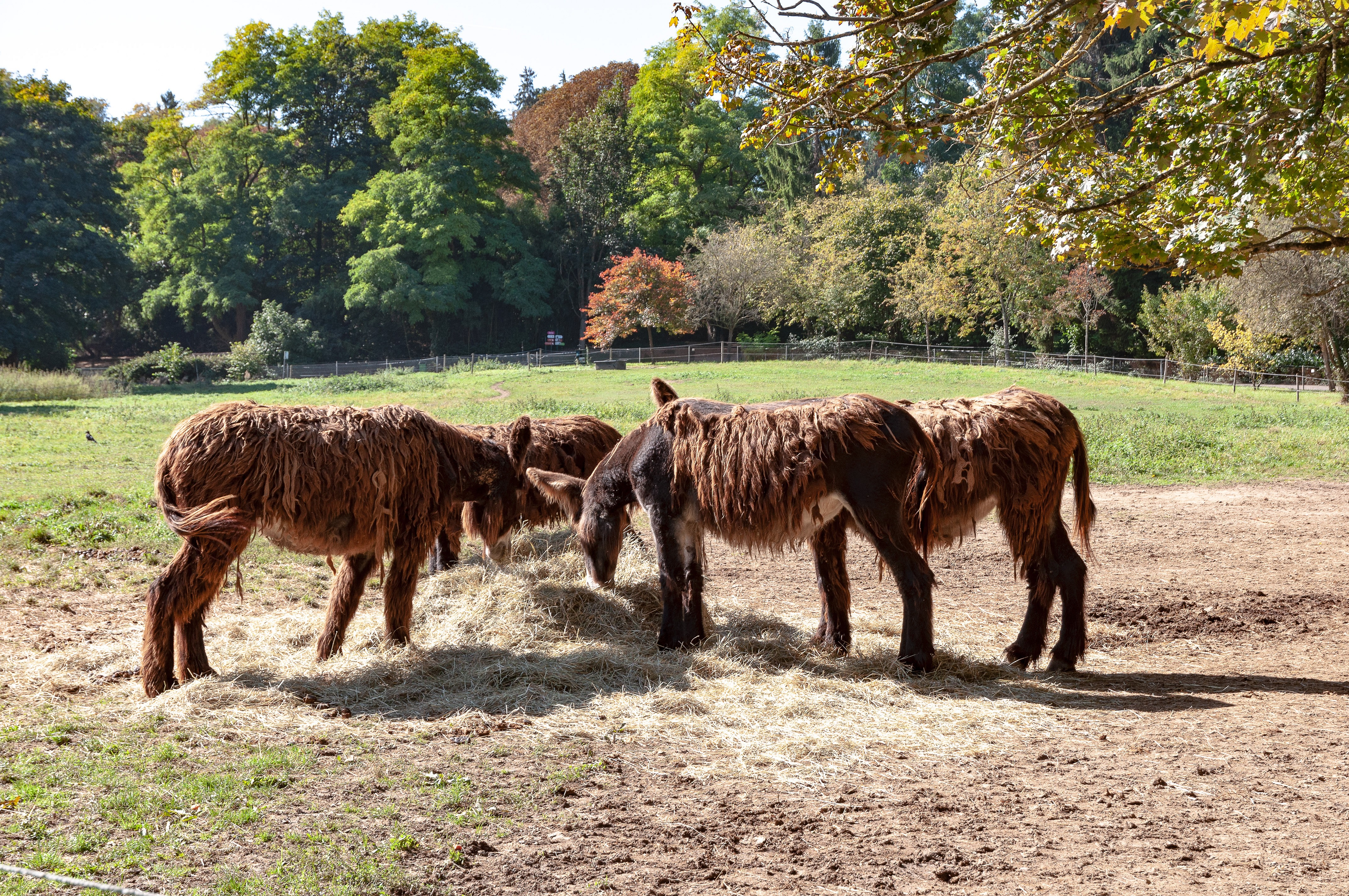 Baudets du Poitou au repas.